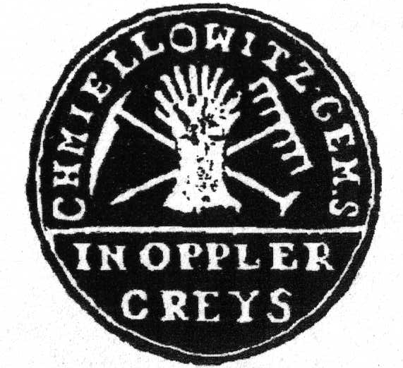 Chmielowitz - Chmielowice. Stara pięczęć gminna